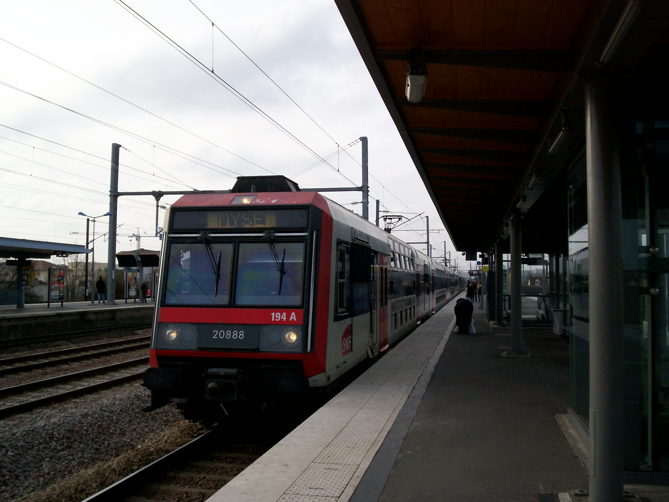 Rame Z 20500 effectuant une mission exceptionnellement totalement omnibus au départ de Paris-Est et en direction de Meaux